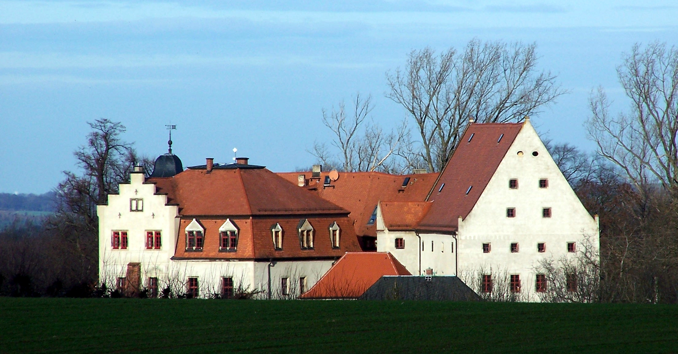 Schloss Batzdorf, Batzdorf, Gemeinde Klipphausen, Landkreis Meißen